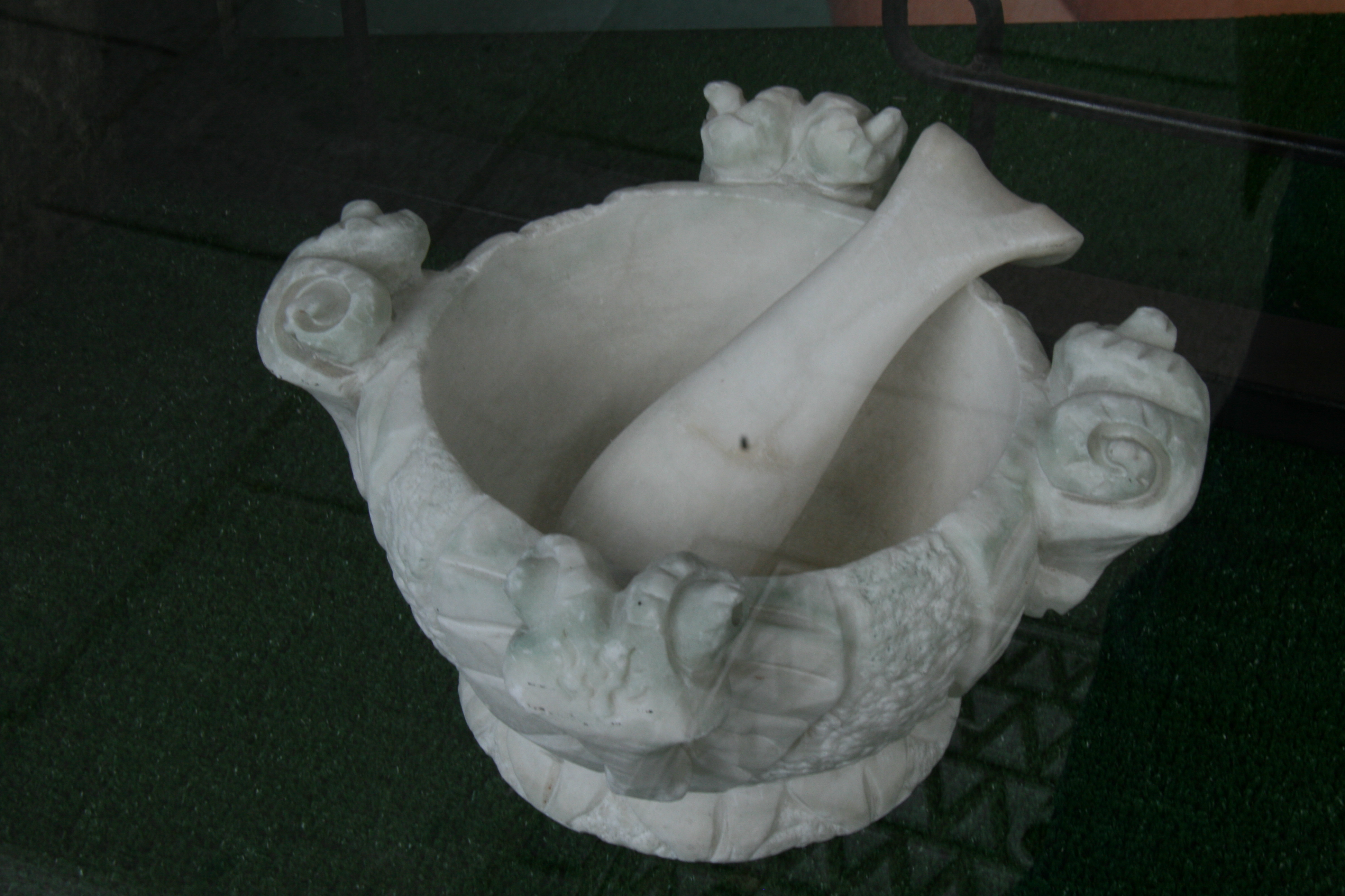 Mortero de marmol - Farmacia